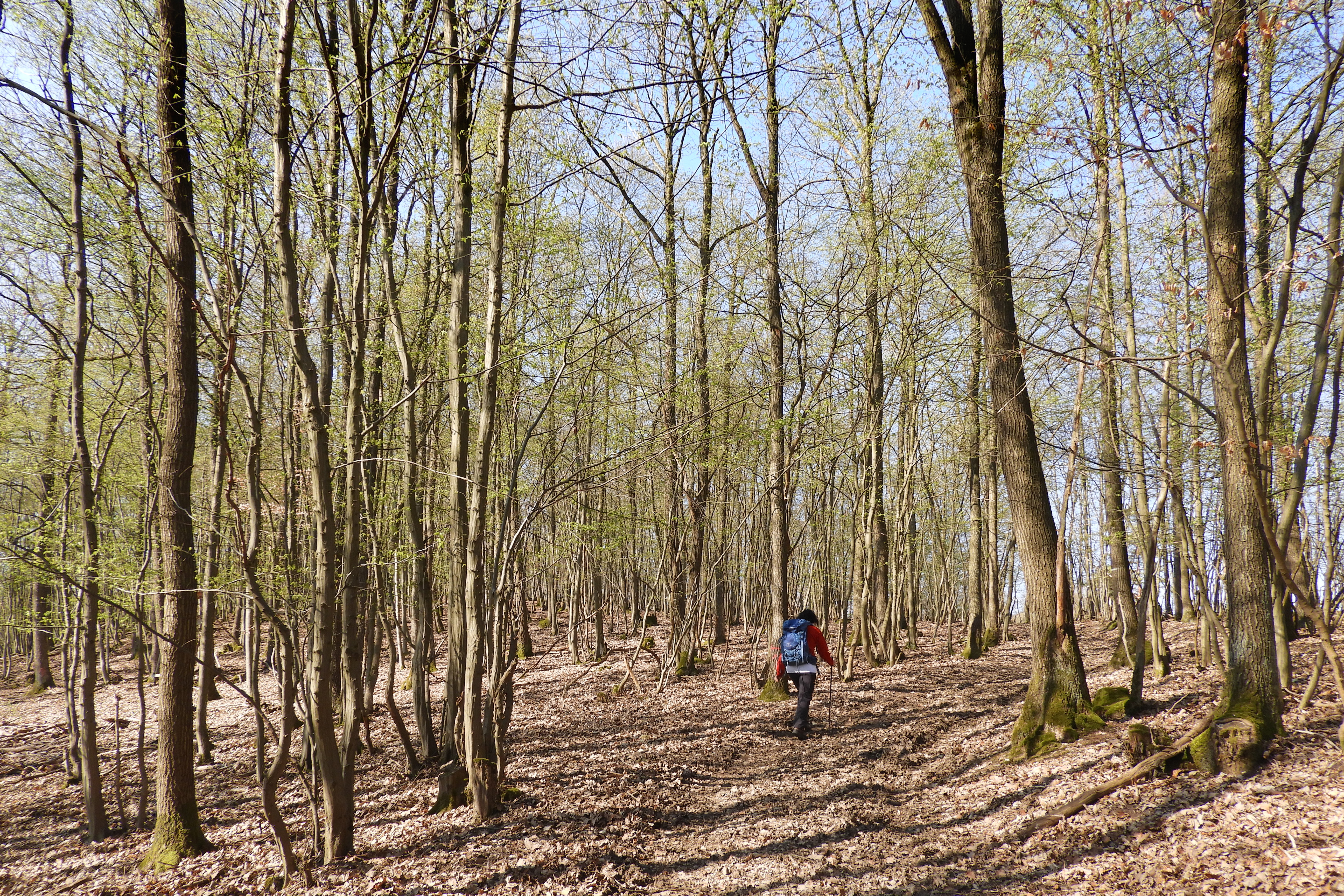 Der Trimberg bei Reichensachsen ist eine Bergkuppe im nordhessischen Werra-Meißner-Kreis, die sich mit einer Höhe von 332,6 m westlich und nördlich des Tals der Wehre erhebt. Die Vegetation besteht aus artenreichen Buchenwäldern, die in großen Teilen aus einer ehemaligen Niederwaldbewirtschaftung hervorgegangen sind. Um die im Gebiet des Trimberges lebenden seltenen Tierarten und die hier vorkommenden gefährdeten Pflanzenarten einschließlich ihrer Lebensräume und Standorte zu schützen wurde der Bereich im Dezember 1993 zum Naturschutzgebiet erklärt und später an die EU-Kommission als Flora-Fauna-Habitat-Gebiet für das länderübergreifende Schutzgebietssystems Natura 2000 gemeldet. Das Schutzgebiet liegt westlich des Ortsteils Reichensachsen und nördlich des Ortsteils Oetmannshausen der Gemeinde Wehretal.